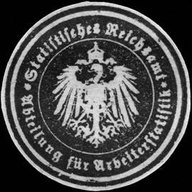 Sealing stamp Title: Statistisches Reichsamt - Abteilung für Arbeiterstatistik Description: weiss, schwarz Place: size: 4 cm